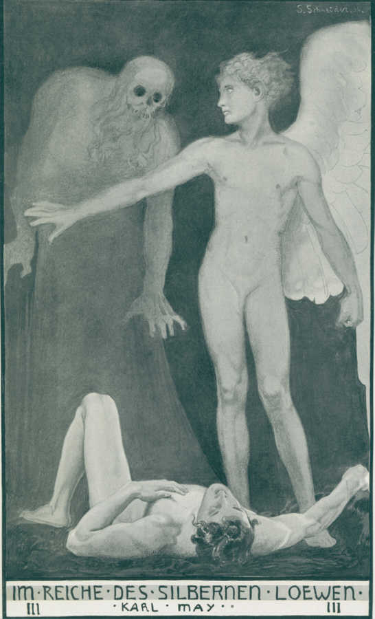 Deckelbild zu Karl Mays Reiseerzählung Im Reiche des silbernen Löwen III (Sascha-Schneider-Ausgabe)